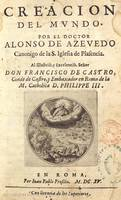 Aquesta és la coberta del llibre de l'obra més coneguda de Alonso de Acevedo